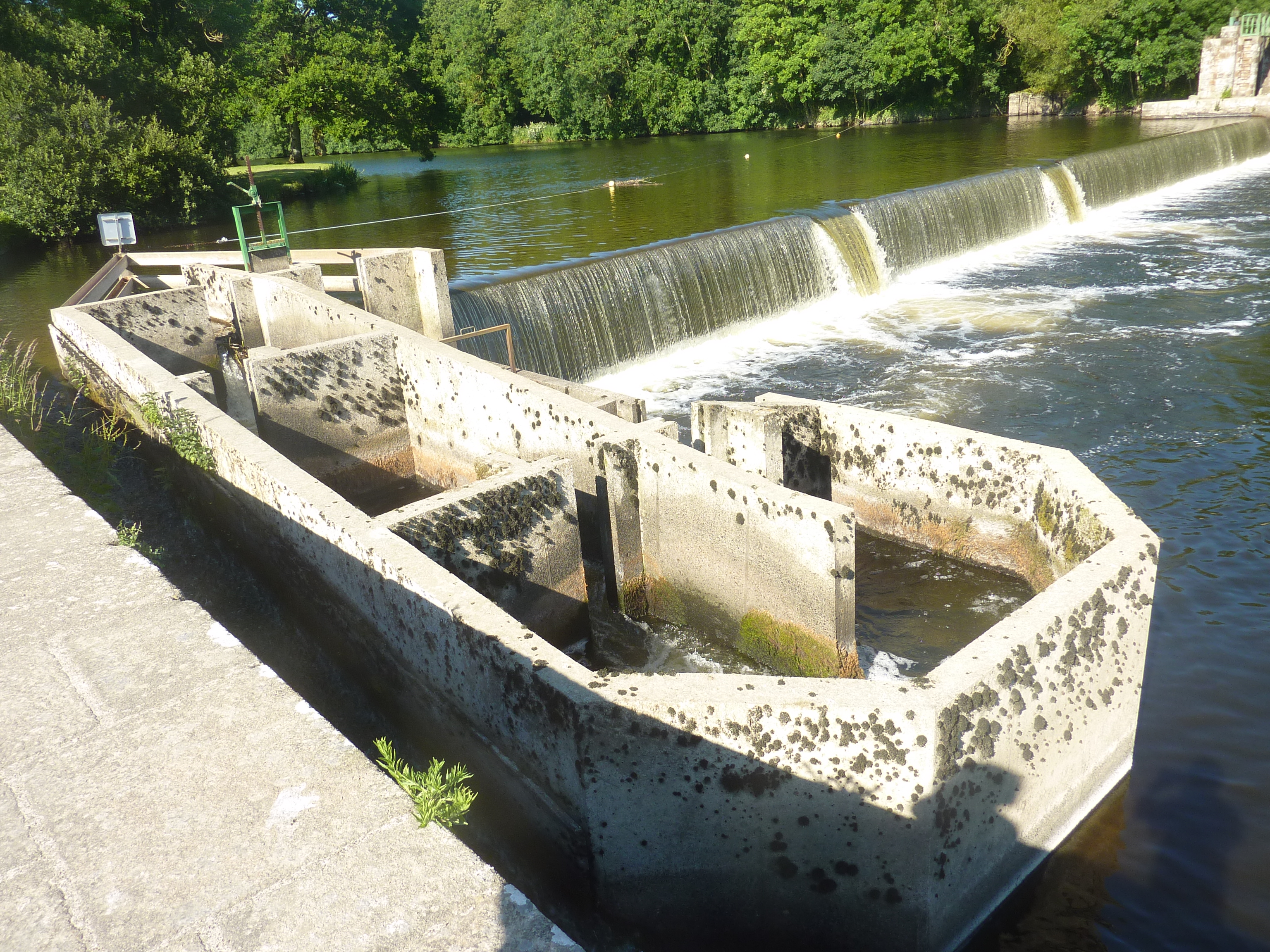 La passe à poissons de l'écluse de Penarpont (Pennarpont) (écluse n°232 du canal de Nantes à Brest, Aulne canalisée)